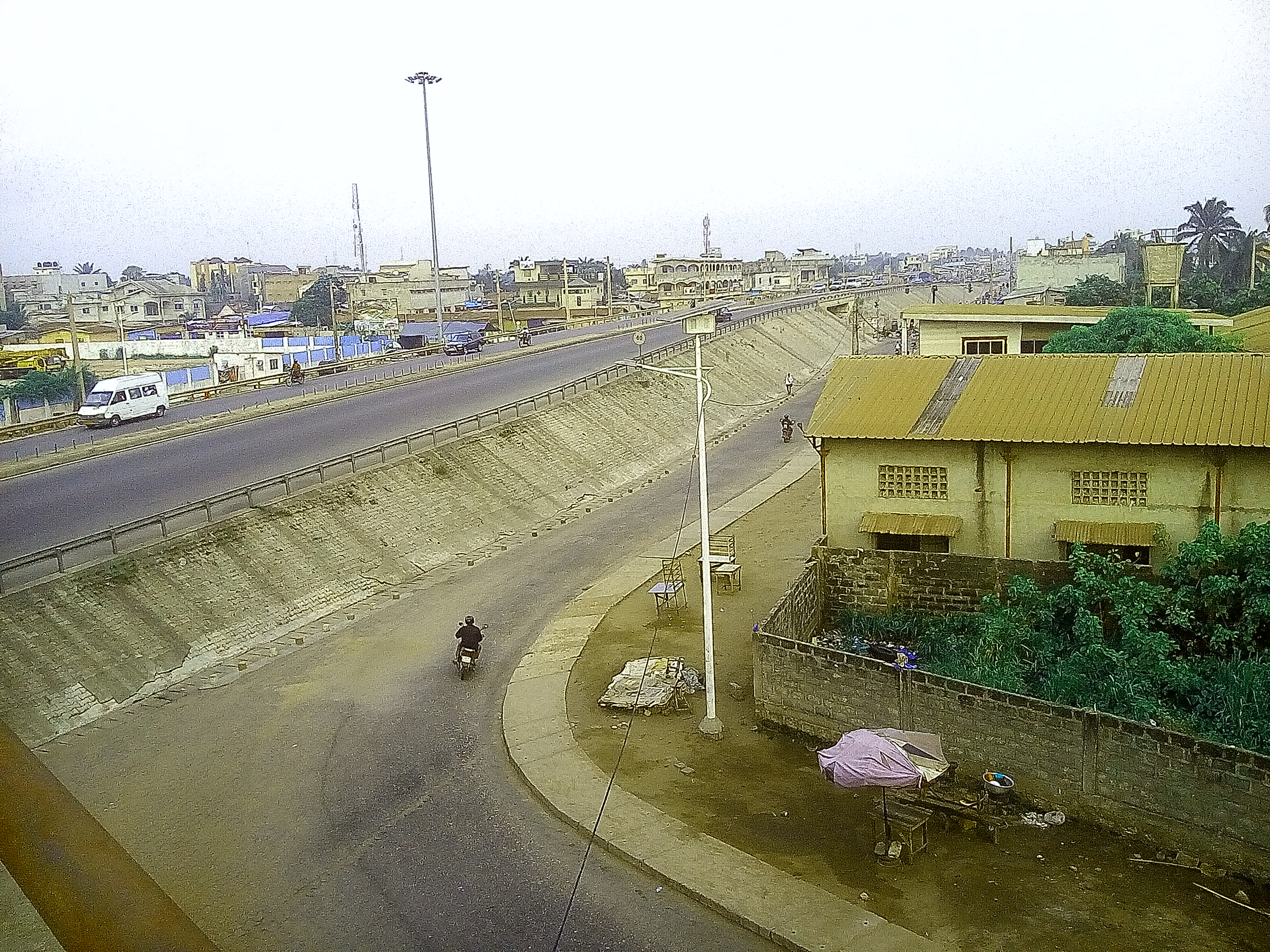 la voie inetr-état prenant sur l'échanger de godomey. This is an image with the theme "Africa on the Move or Transport" from: Benin